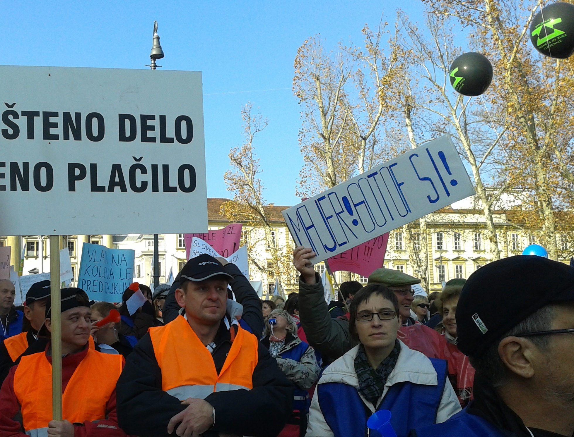 "Majer, gotof si!" Delavski protesti proti varčevalnim ukrepom, Ljubljana, Kongresni trg, sobota, 17. november 2012. Sindikalne centrale, ki so organizirale demonstracije, so bile: Konfederacija sindikatov javnega sektorja Slovenije (KSJS), Zveza svobodnih sindikatov Slovenije (ZSSS) in Konfederacija novih sindikatov Slovenije - Neodvisnost (KNSS).